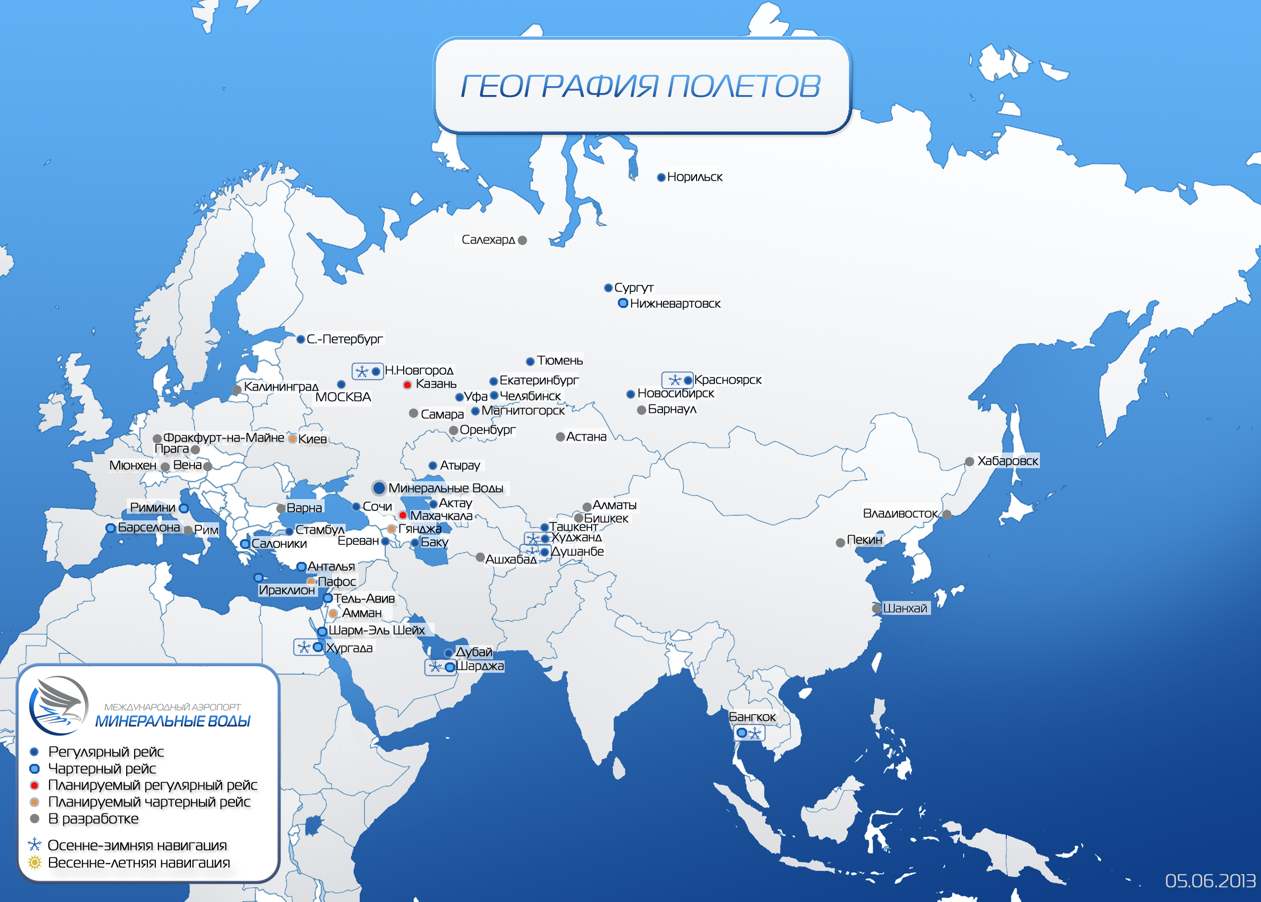 География полетов ОАО «Международный аэропорт Минеральные Воды»